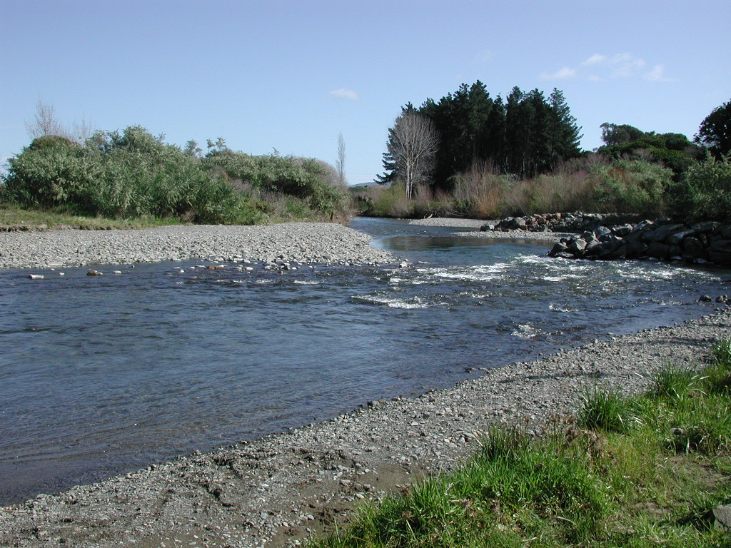 Waikanae River in Waikanae in winter 2002, looking west (downstream).